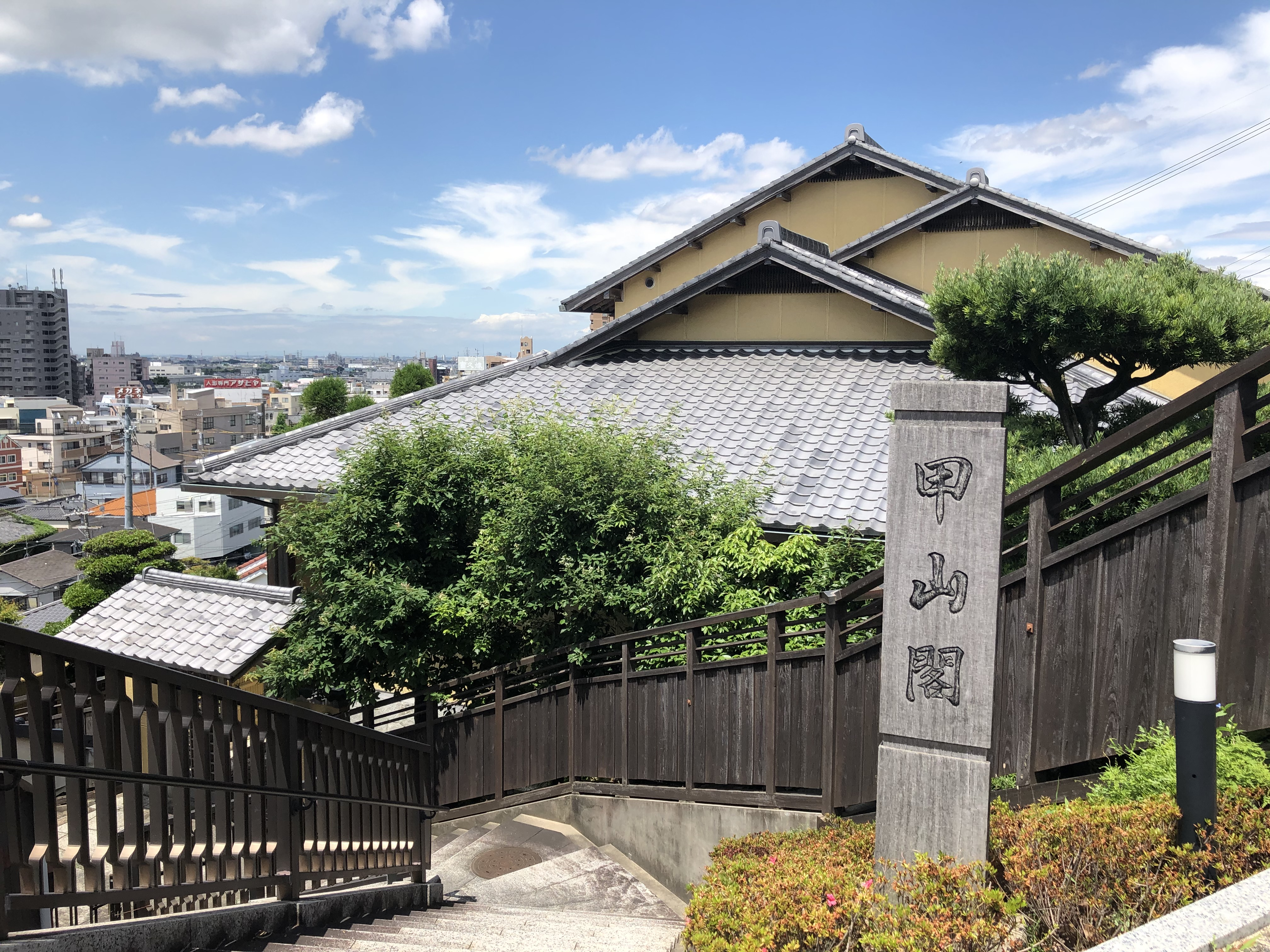 甲山閣（岡崎市六供町）